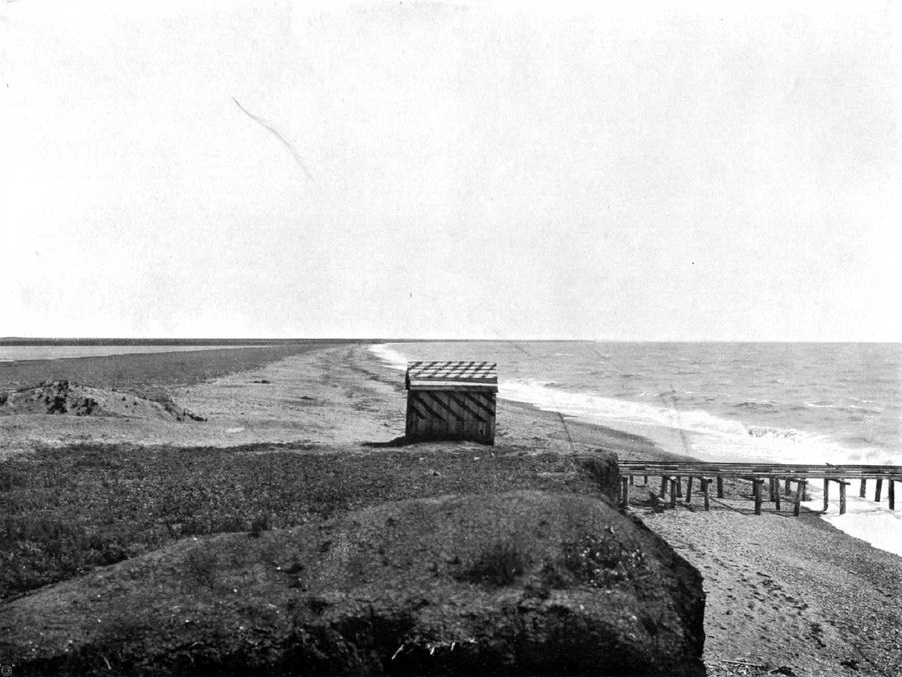 Книга "Виды полей сражений Крымcкой кампании 1854 - 1855 гг. По фотографиям полковника В.Н. Клембовского" — СПб.: Экспедиция заготовления государственных бумаг, 1904.